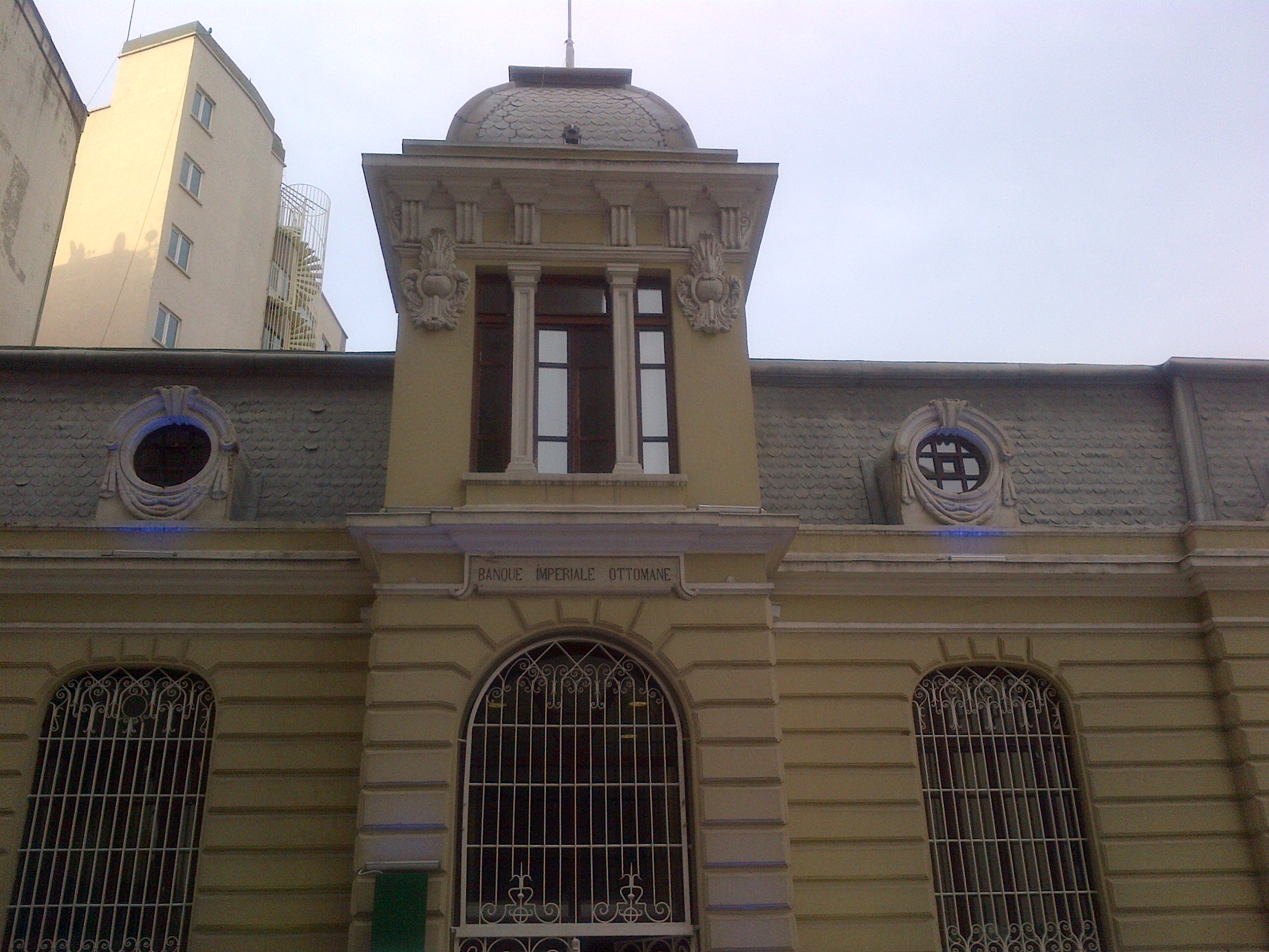 Antigua sucursal del Banco Otomano en Samsun.